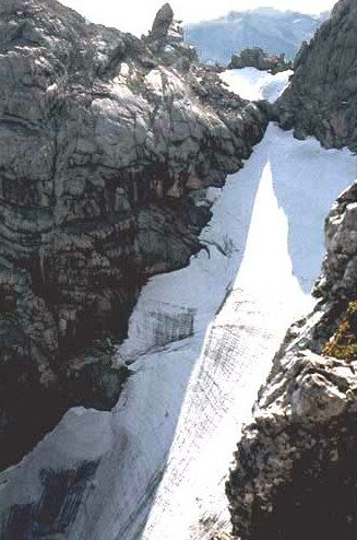 Der steile Blaueisgletscher gesehen vom Hochkalteranstieg über den Schönen Fleck.